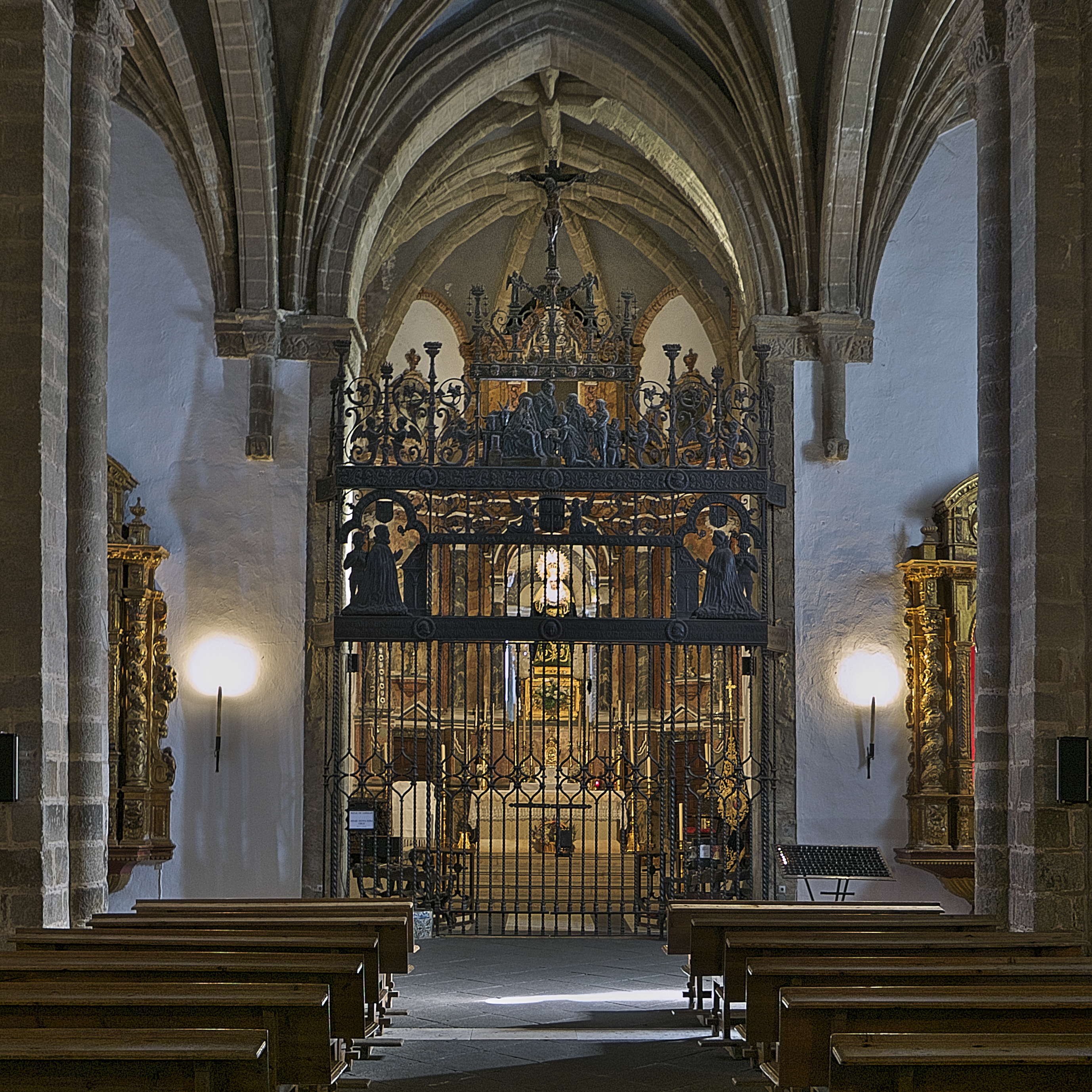 Destaca la magnífica reja de Julio Pascual (1927).